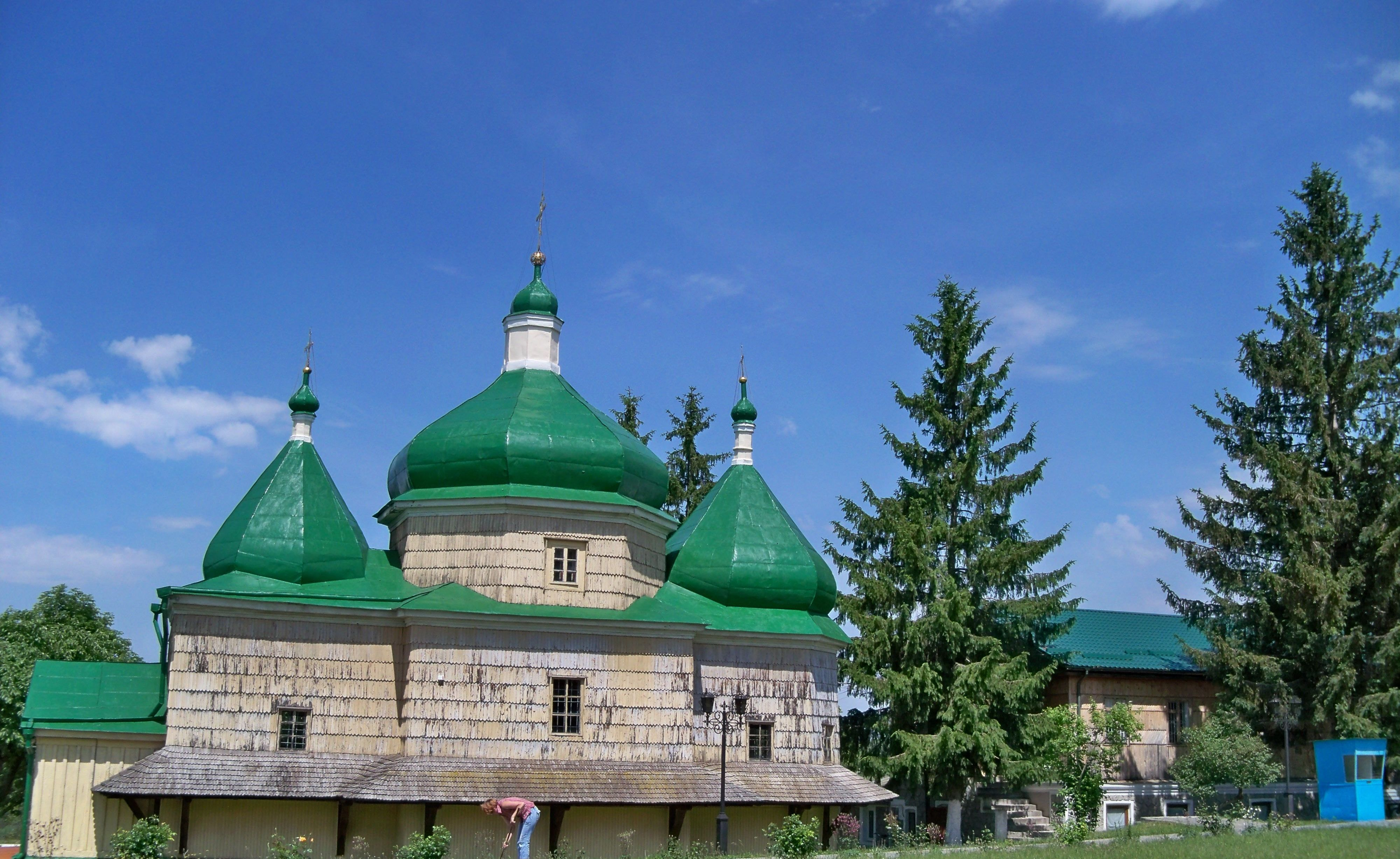 Церква св. Михаїла (дер.), село Пляшева